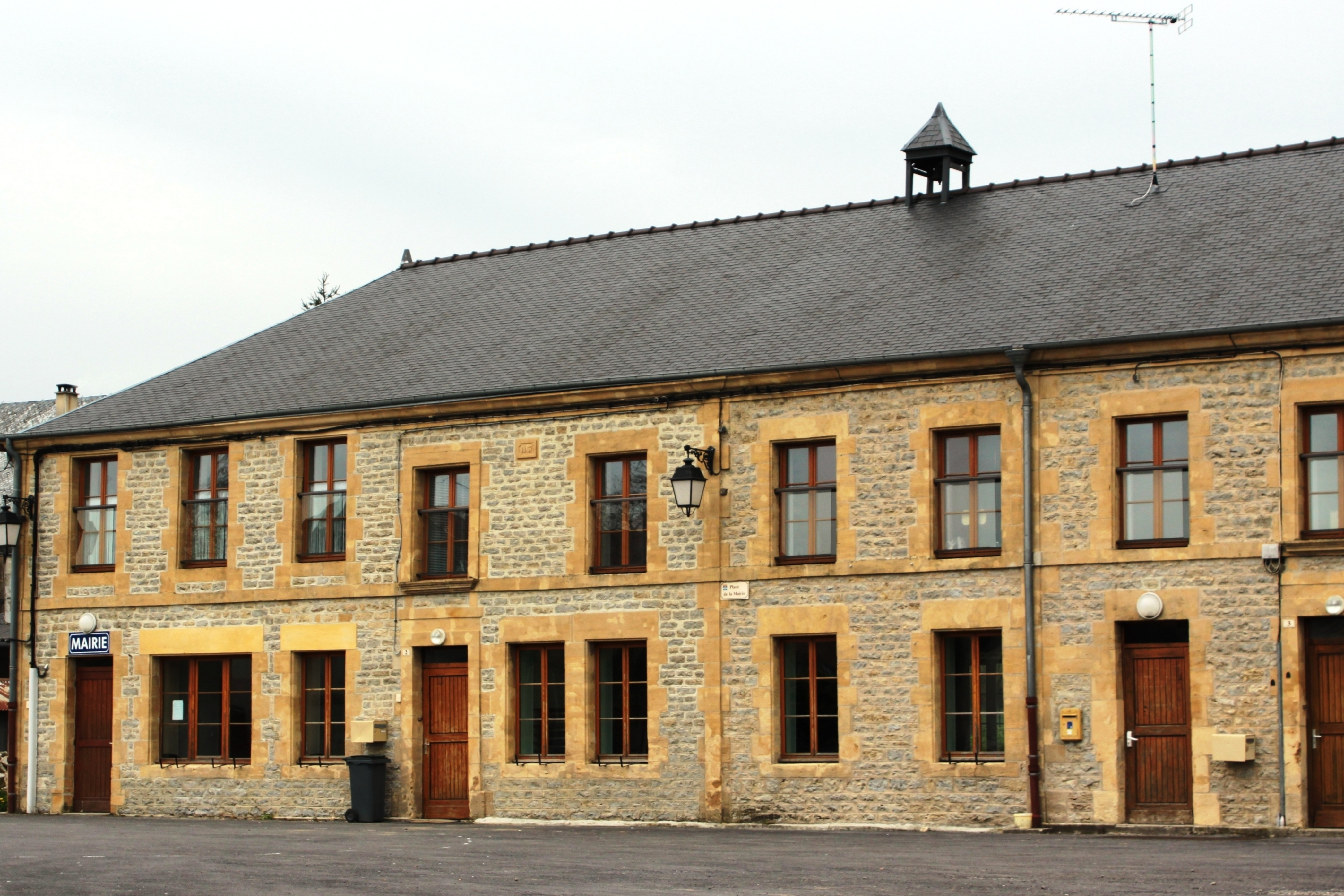 D'Märei vu Sauville